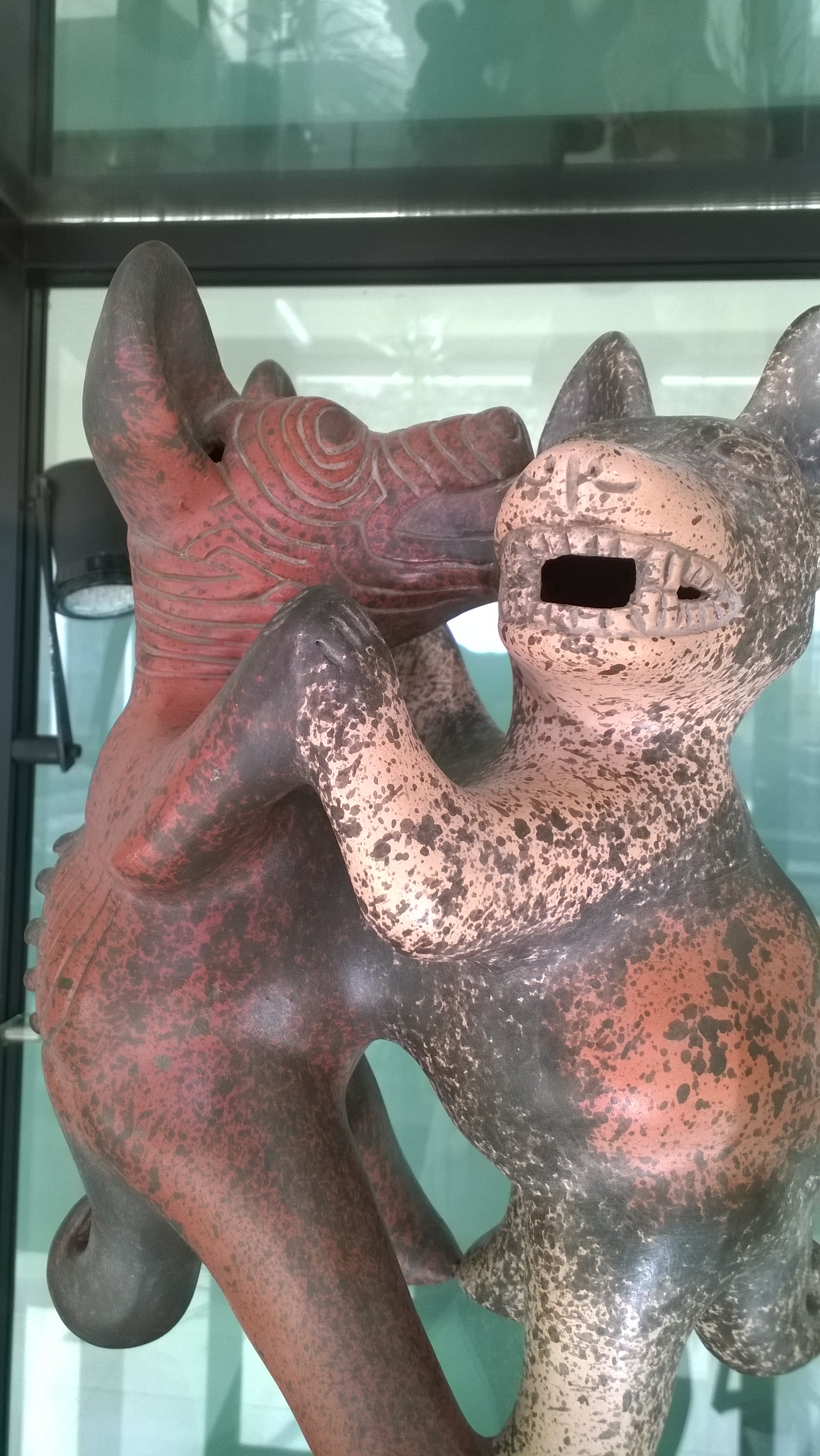 Plaza de las Tres Culturas Mexico City